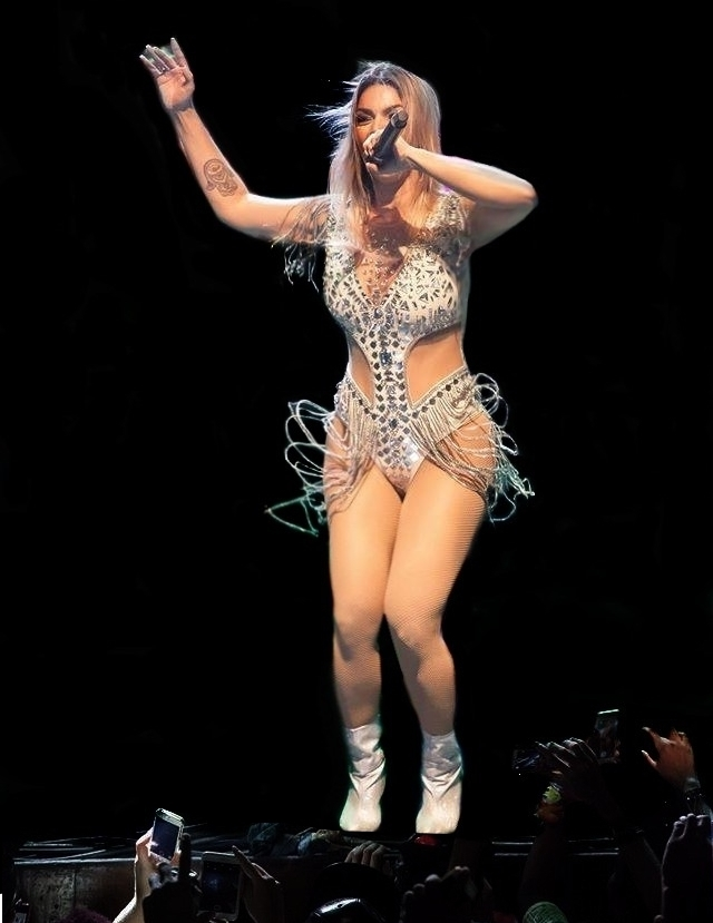 Kelly Key durante show em 2016. Foto por Marília Camargo.